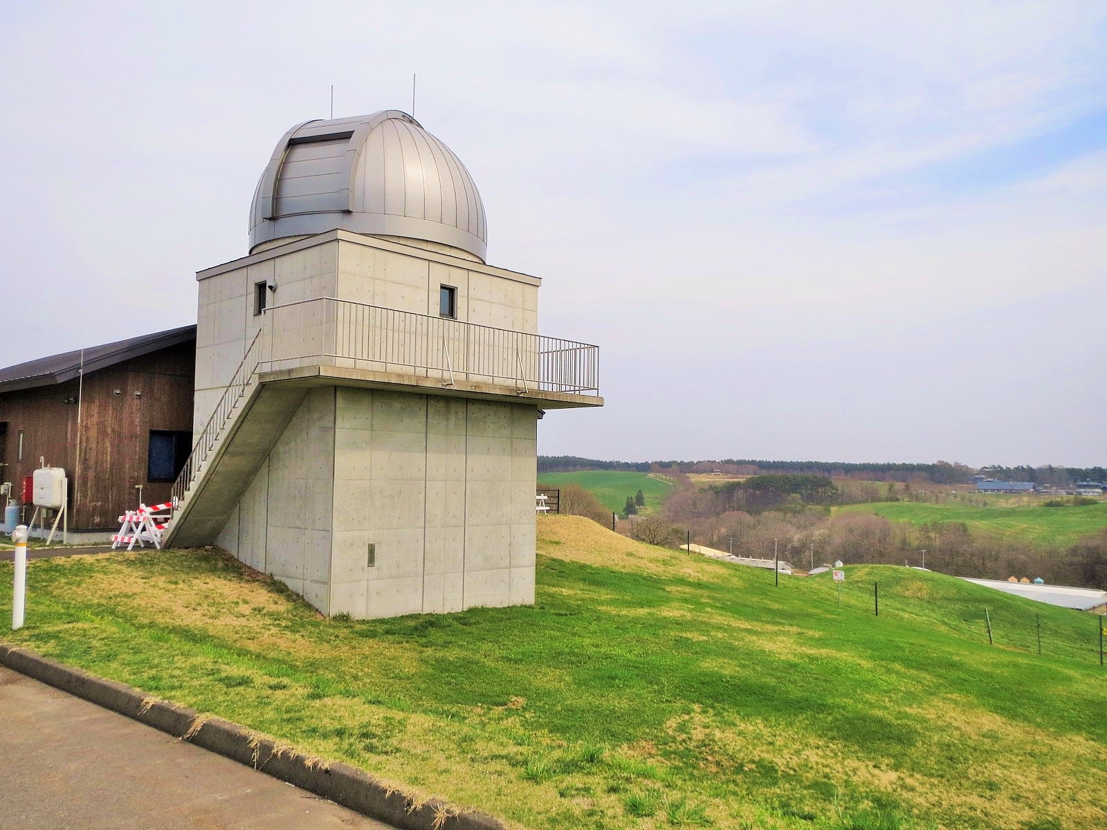 道の駅おおのにある天文台